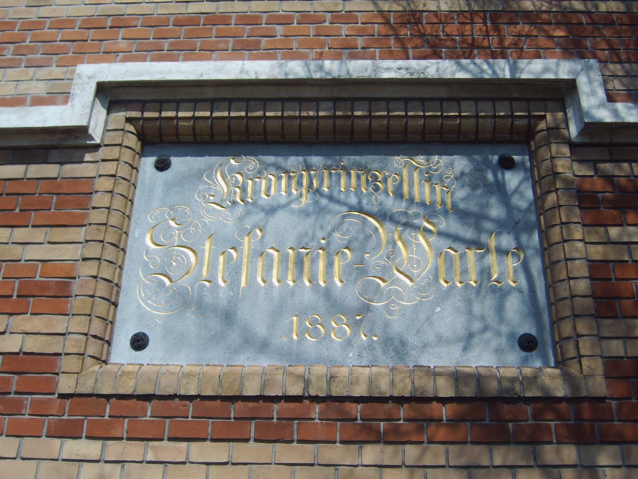 Inschrift auf der Stefaniewarte in Wien. Aufgenommen von mir.